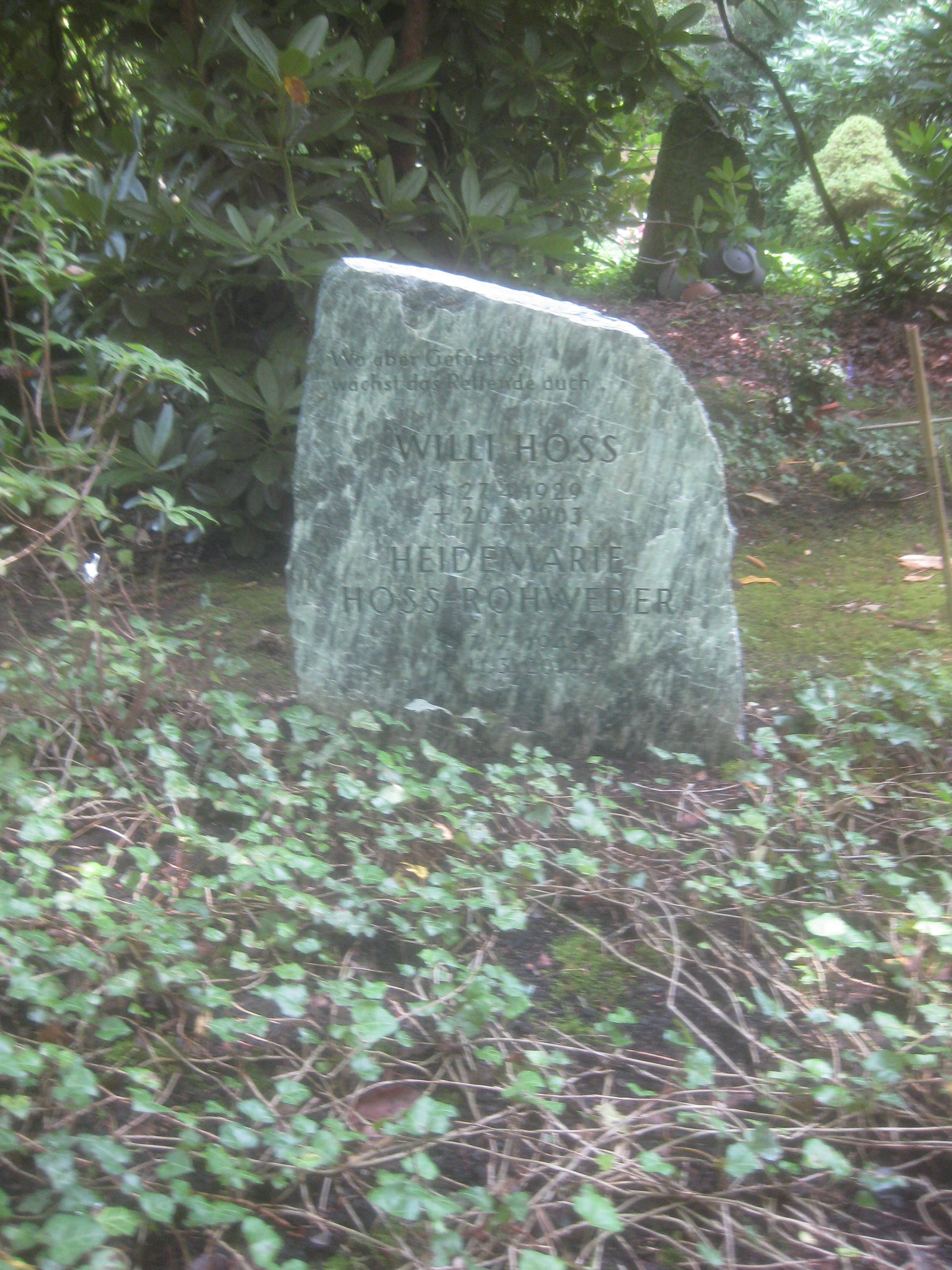 Grab von Willi Hoss, Stuttgart, Waldfriedhof Stuttgart, Abteilung 14 f2.